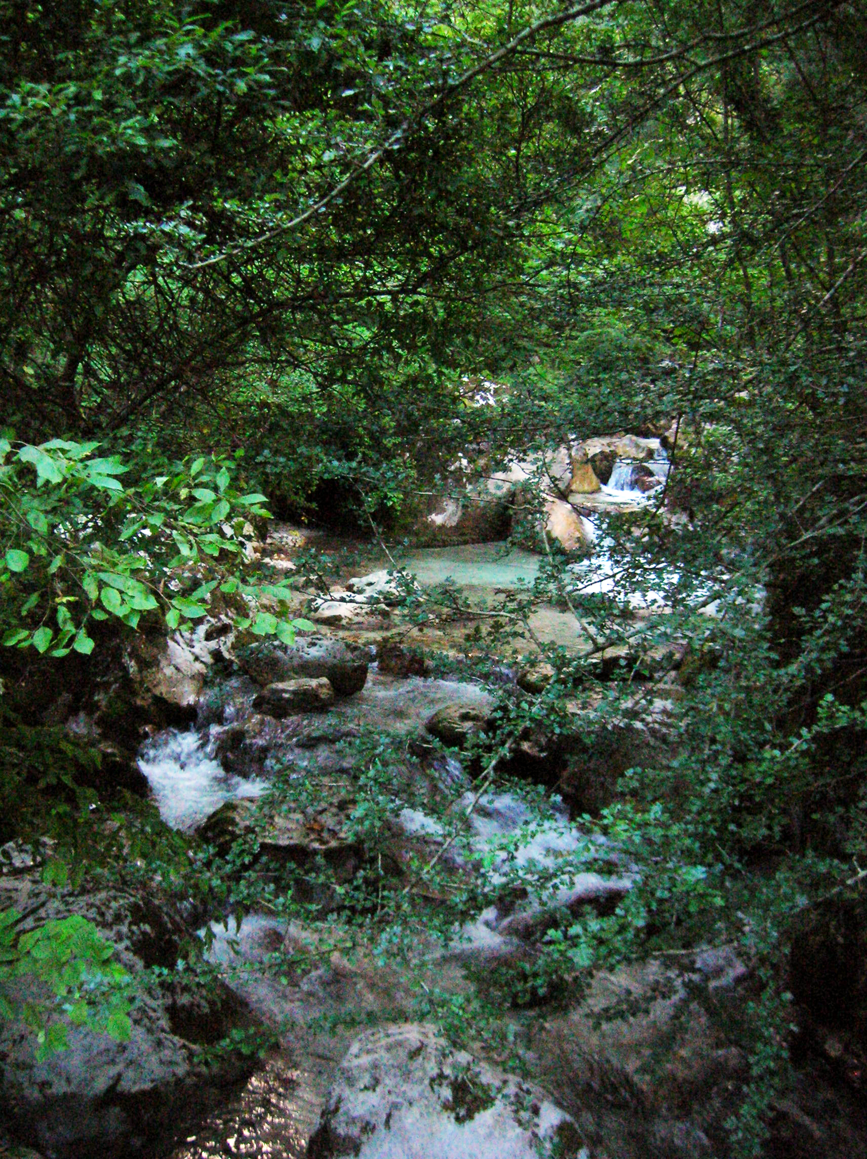 nome errato di Torrente Mavone, quasi certamente sono le Cascate del Ruzzo vicino a Pretara (Isola del Gran Sasso)